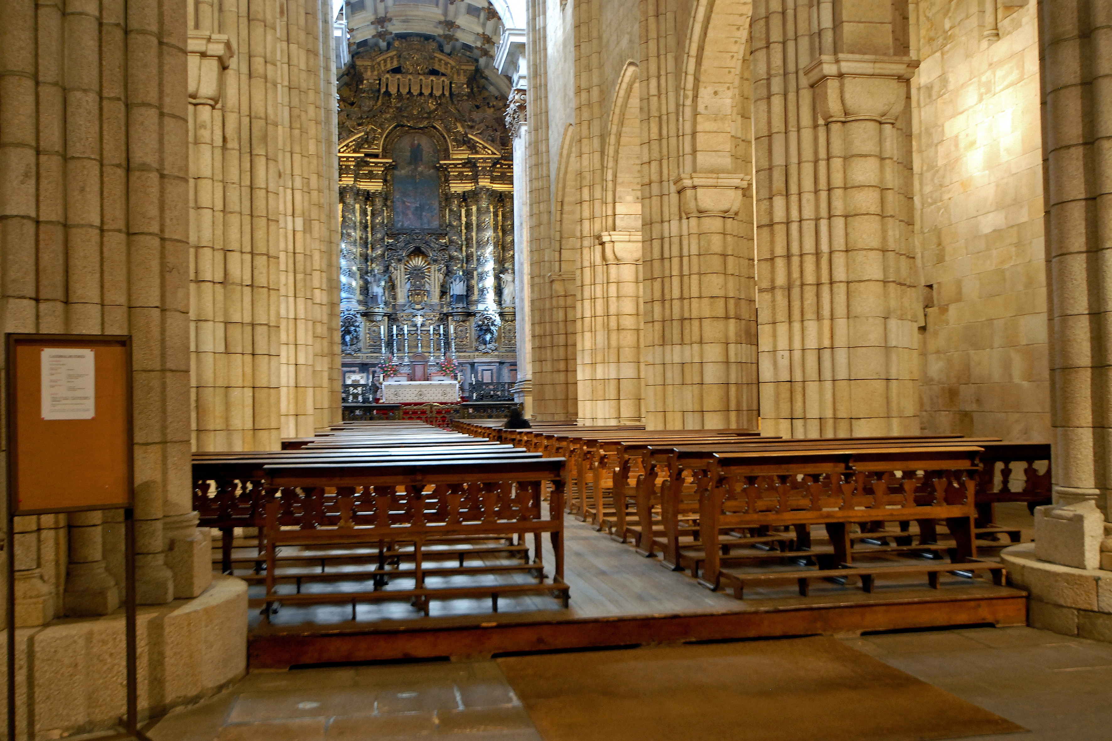 Sé Catedral do Porto ou Sé do Porto This file was uploaded for Wiki Loves Monuments in Portugal with the unique identifier 70397.